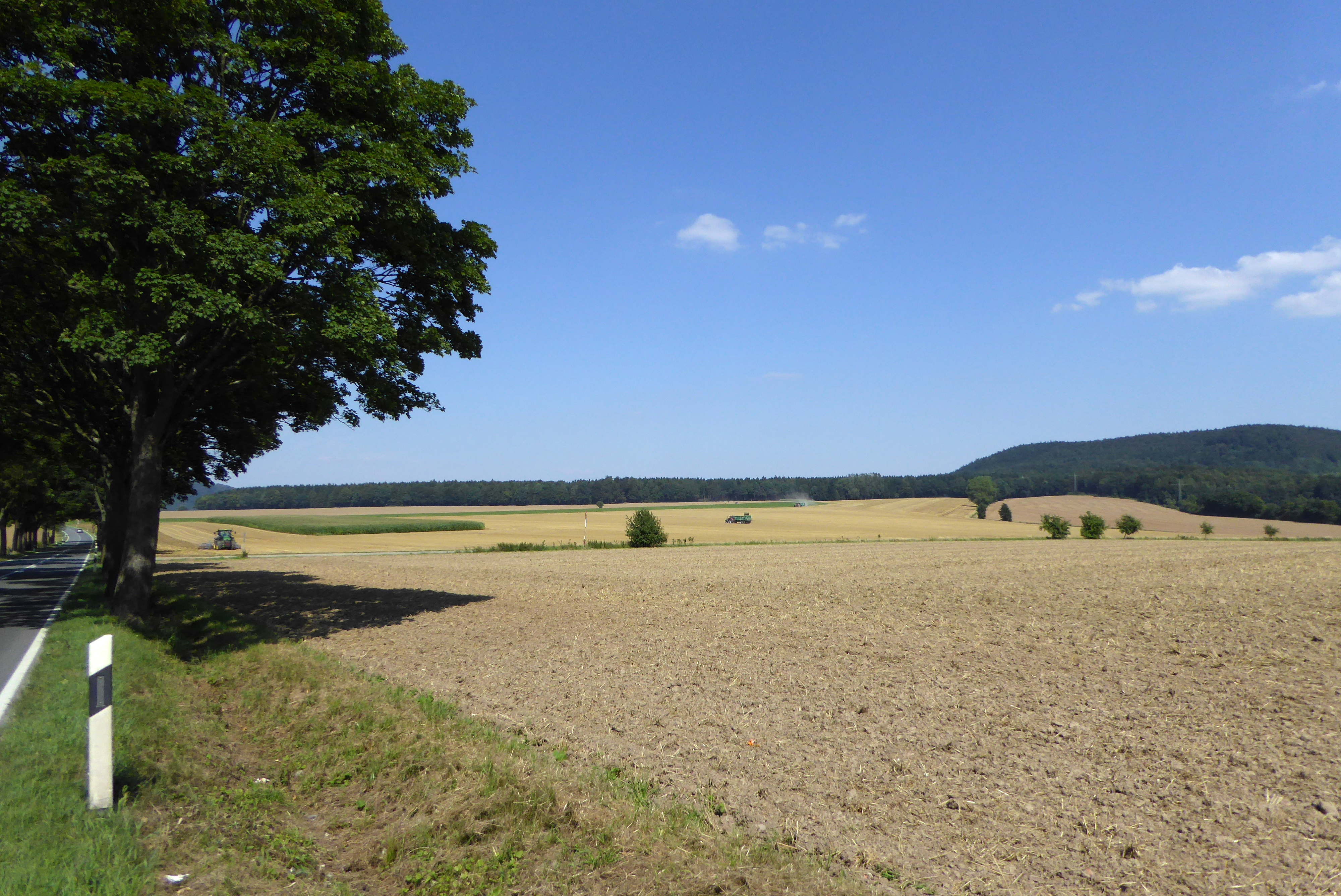 Blick von Süden über den Ostteil des Odfeldes zwischen Stadtoldendorf, Homburg, Amelungdborn und Holenberg im Landkreis Holzminden. Links die Landstraße 581, ganz rechts hinten der Homburgwald (Kohlenberg), ganz links hinten hinter den Bäumen der Vogler (Piepenberg).